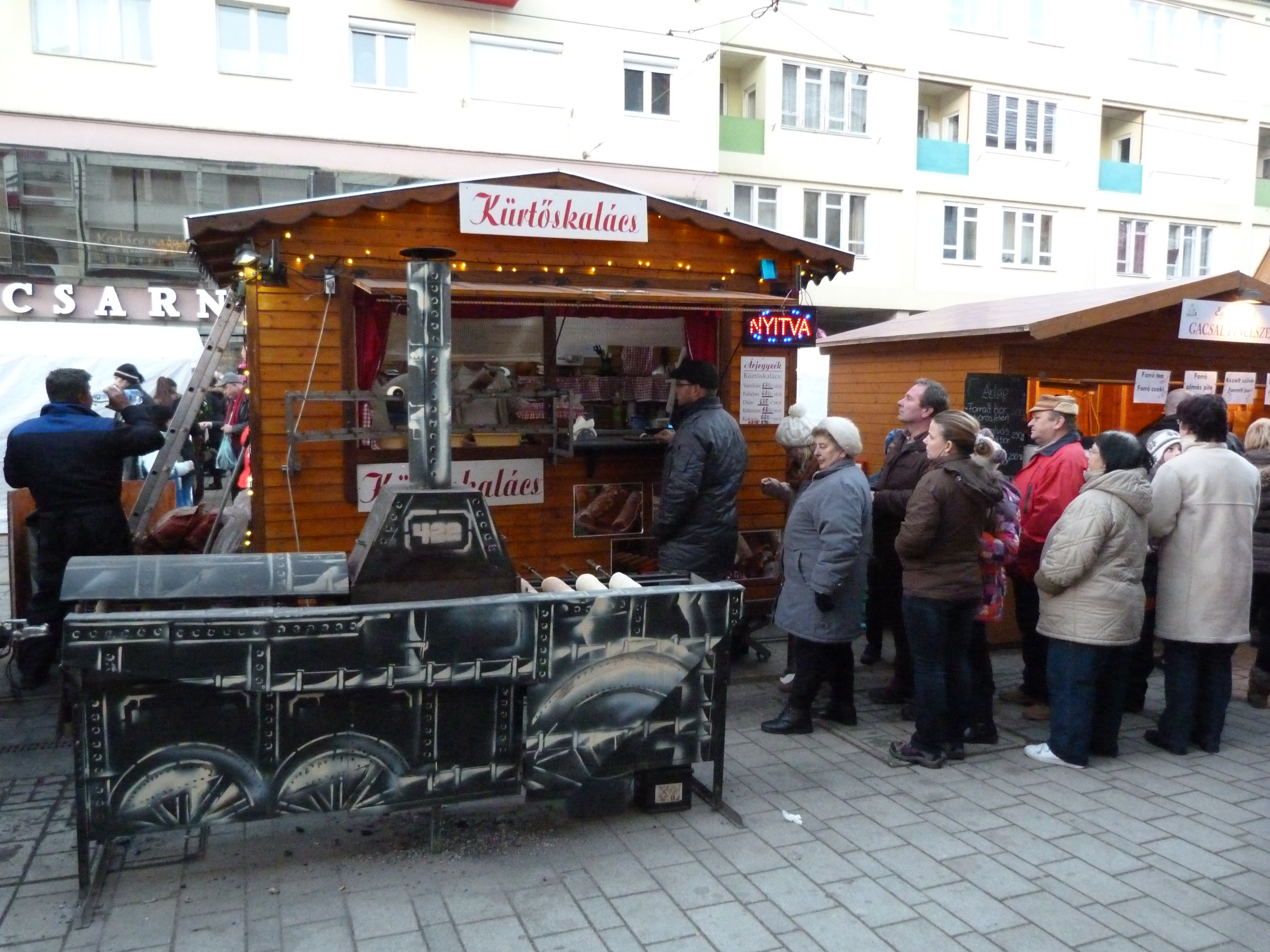 A felvétel 2015. február 7-én szombaton készült Miskolcon. Miskolci Kocsonyafesztivál. ©© Derzsi Elekes Andor, Budapest, 2015, Published in the Metapolisz DVD line. You are authorised to use this vid under Creative Commons – even for commercial, for profit purposes. The vid must be attributed to Derzsi Elekes Andor. All of the photos and vids in the Metapolisz DVD line are under Creative Commons and can be used even for commercial – for profit – purposes. Recommended Citation Derzsi Elekes Andor: Metapolisz DVD line